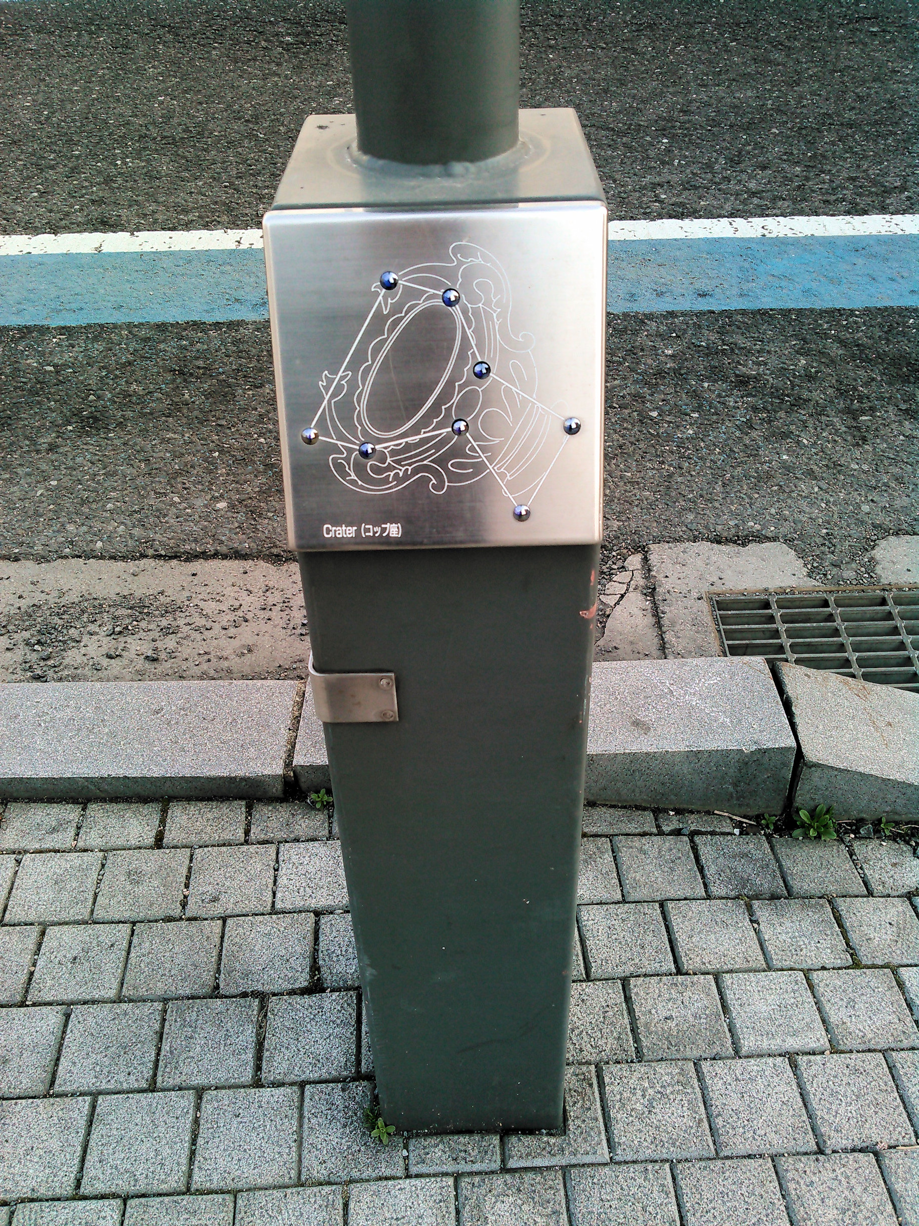 郡山さくら通り街灯レリーフ